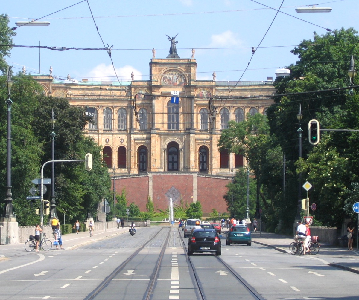 Das Maximilianeum in München, vom Maxmonument auf der Maximilianstraße aus gesehen.